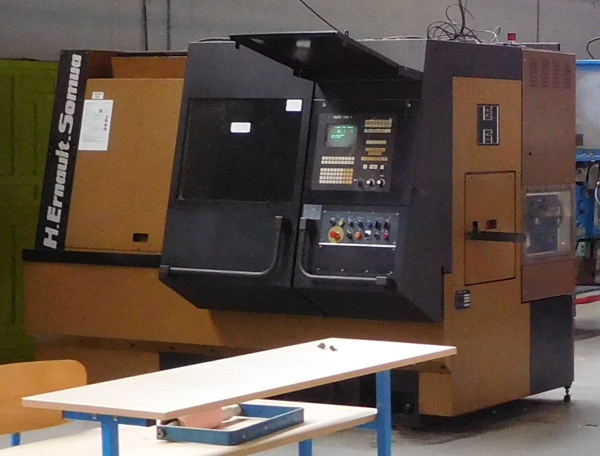 Lycée Albert-Claveille : machine-outil à commande numérique H. Ernault-Somua (HES). Périgueux (Dordogne, France).